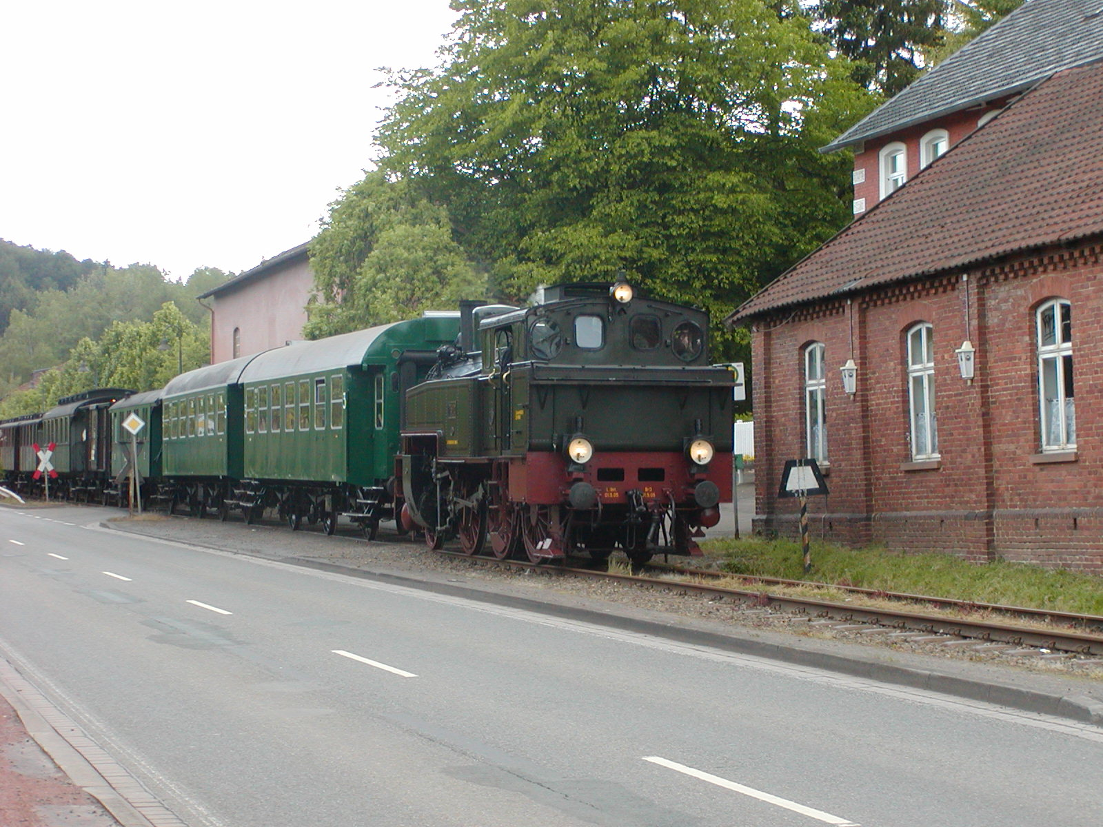 Dampflok 7512 HANNOVER (preußische T11) der Museumseisenbahn Minden mit Wagen aus Minden in Porta Westfalica-Kleinenbremen, Nordrhein-Westfalen.